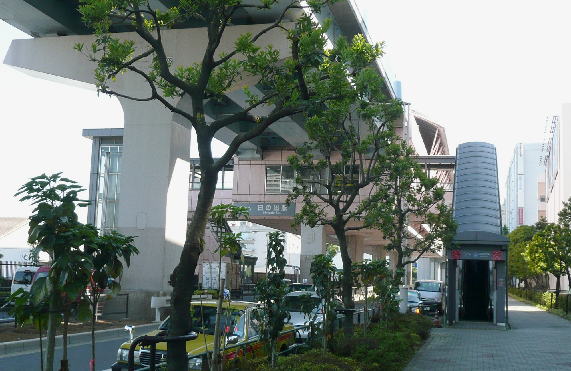 日の出駅